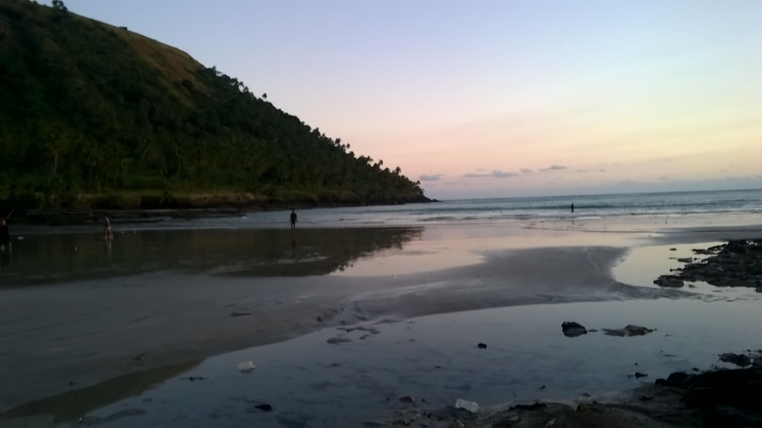 Couché de soleil sur la plage de Mbachilé